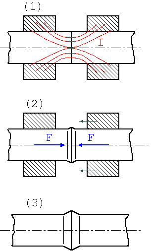 Pressstumpfschweißen - Prinzipskizze, (1)Wärmeeinbringung (2)Krafteinbringung (3)Fertiges Bauteil Andere Versionen